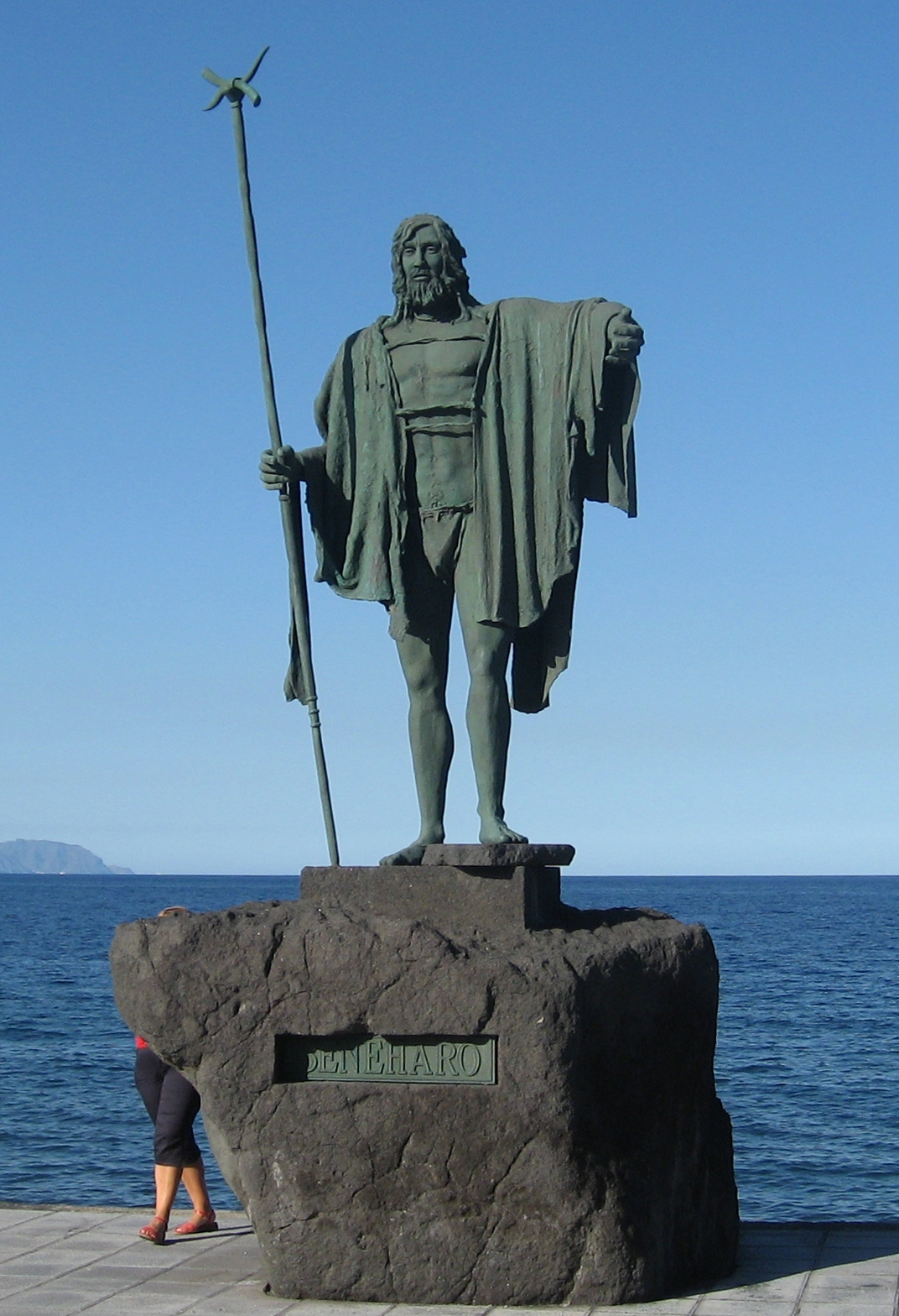 Escultura al Mencey Beneharo en Candelaria, Canarias, España. Escultor: José Abad